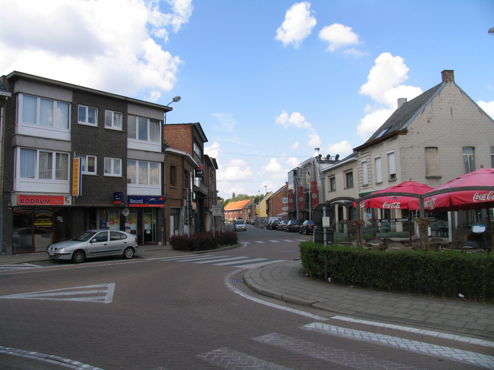 Dorpsplaats Sint-Katelijne-Waver, kijkrichting Stationsstraat - Walem